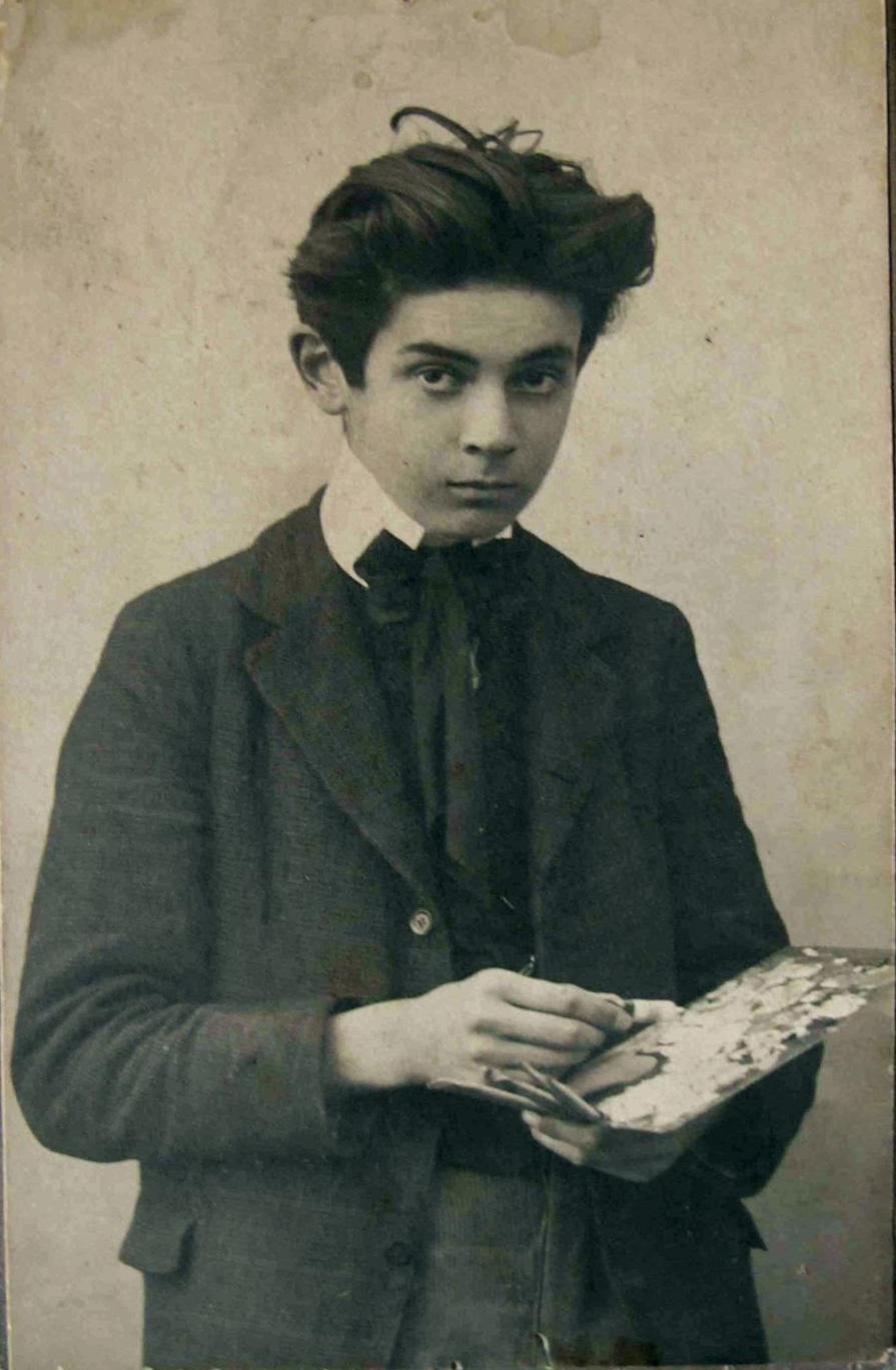 Photographie d'Egon Schiele vers 1905. Photographe inconnu. Collection privée, location indéterminée.